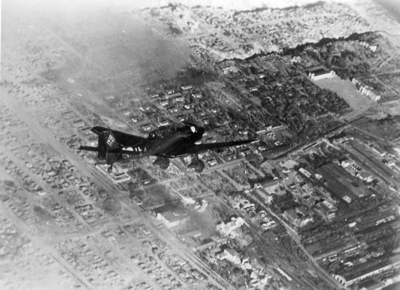 Russland, Kampf um Stalingrad, Luftangriff An der Sowjetfront: Stuka über Stalingrad.- Die Maschine des Kommandeurs, der seine Gruppe führt. PK-Aufnahme: Kriegsberichter Opitz (Sch) 5703-42 "Fr.Fr.OKW" Oktober 1942 [Herausgabedatum] [Sowjetunion.- Schlacht um Stalingrad.- Luftangriff mit Flugzeug Junkers Ju 87 "Stuka"]